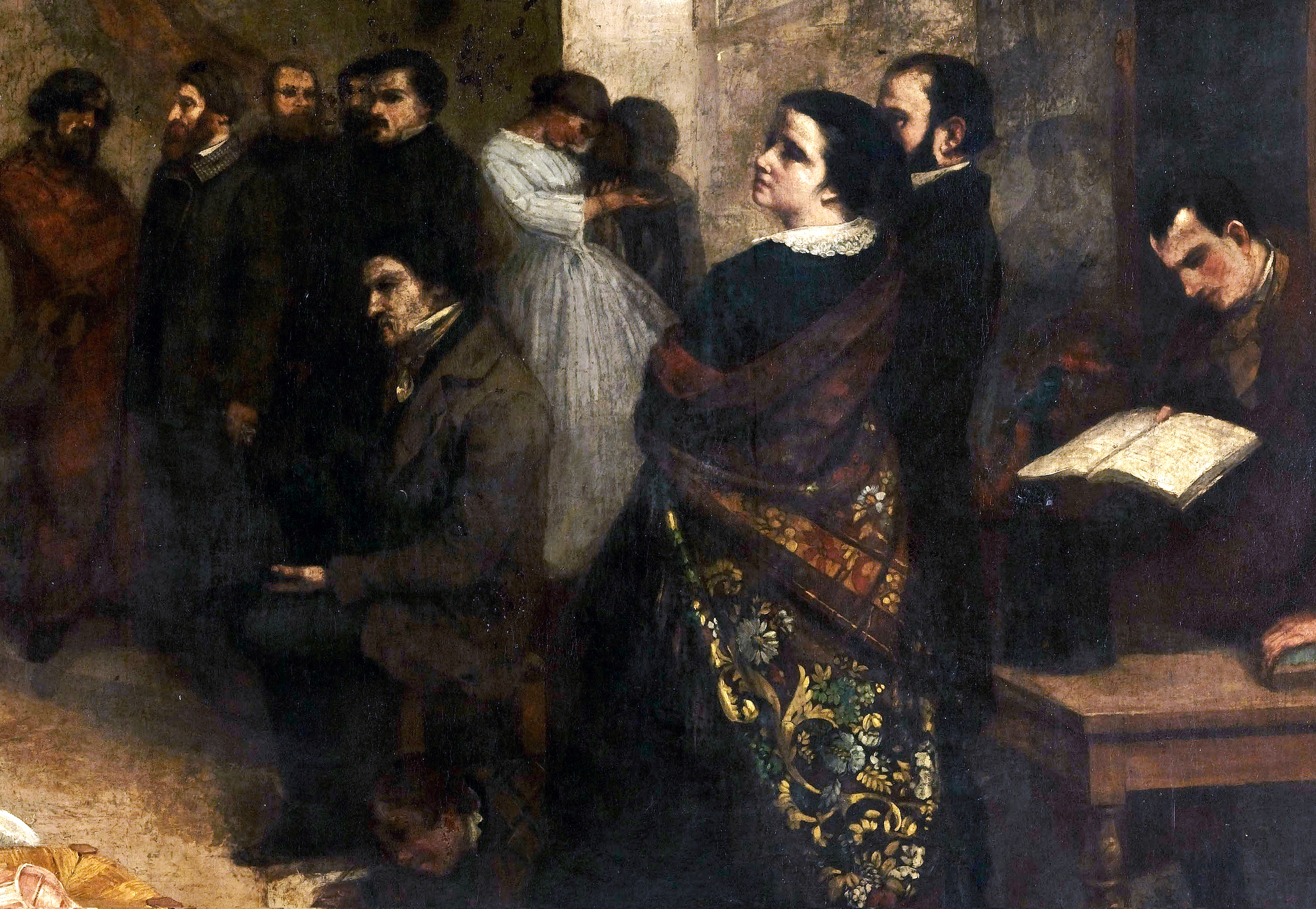 detail (right half)